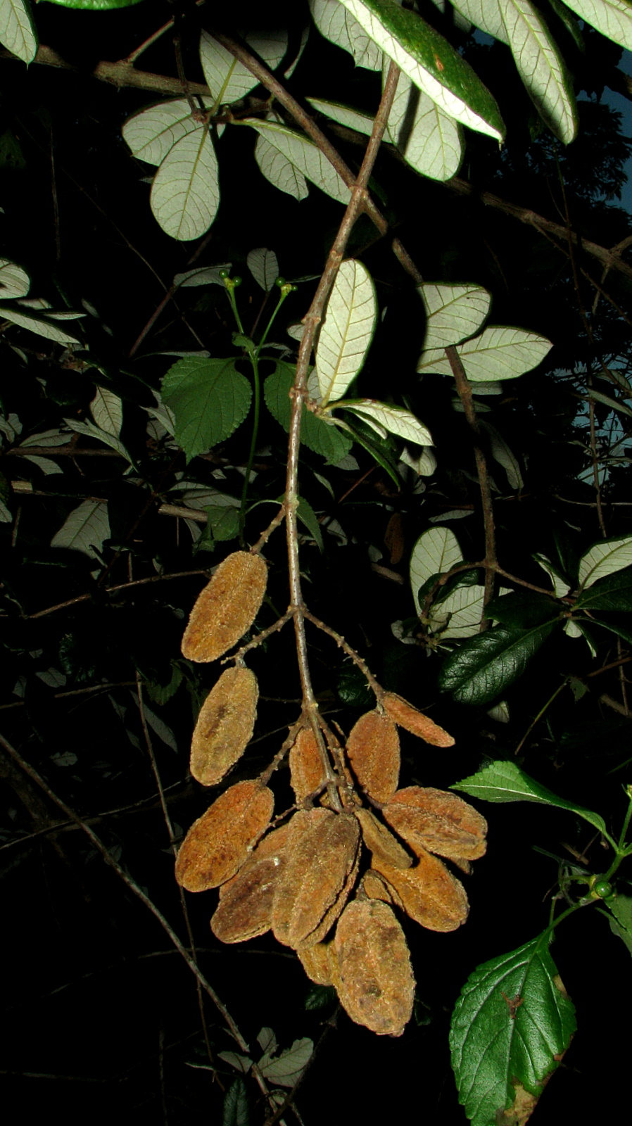 Trigonia nivea Cambess. var. pubescens (Cambess.) Lleras